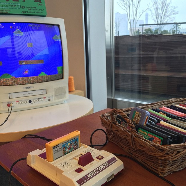 雨の日はファミコンで遊べる